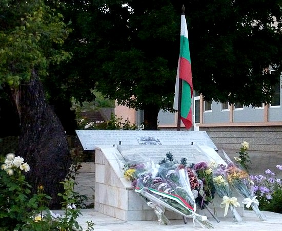 До нея е изградена паметна плоча, в чест на четата на Хаджи Димитър и Стефан Караджа.